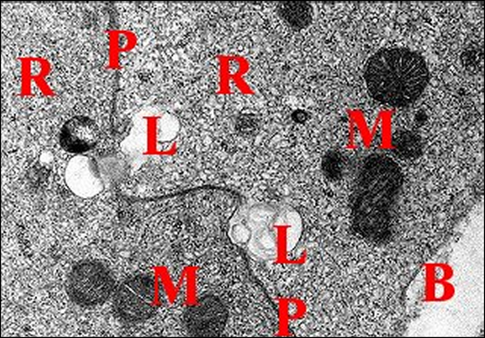 Tissu endocrinoïde de Mastophora au microscope électronique à transmission avec les organites subcellulaires dont un réticulum très développé.